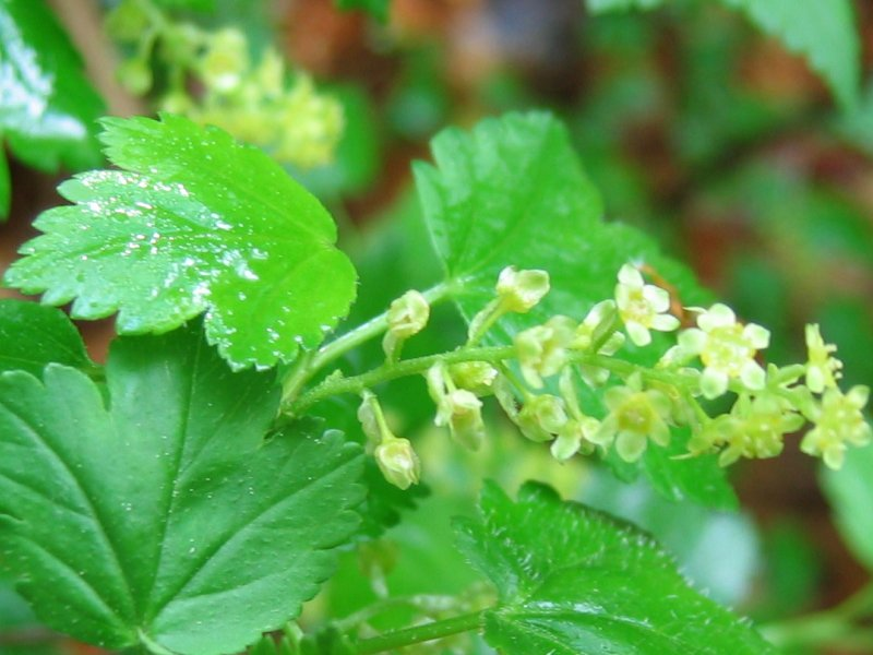 Alpen-Johannesbeere Ribes alpinum, Rügen